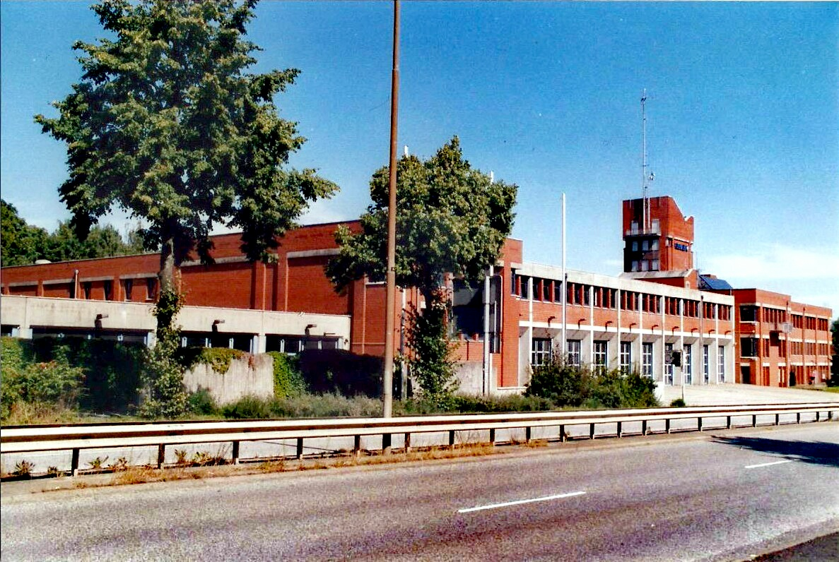 Derzeitige Hauptfeuerwache der Hansestadt Lübeck.